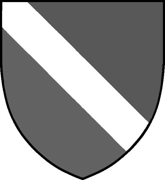 Vapensköld med snedbjälke, tinktur okänd